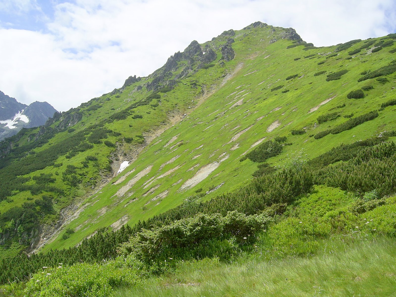 Zbocza Opalonego w rejonie Wolarni nad Kępą. Po lewej Cubryna